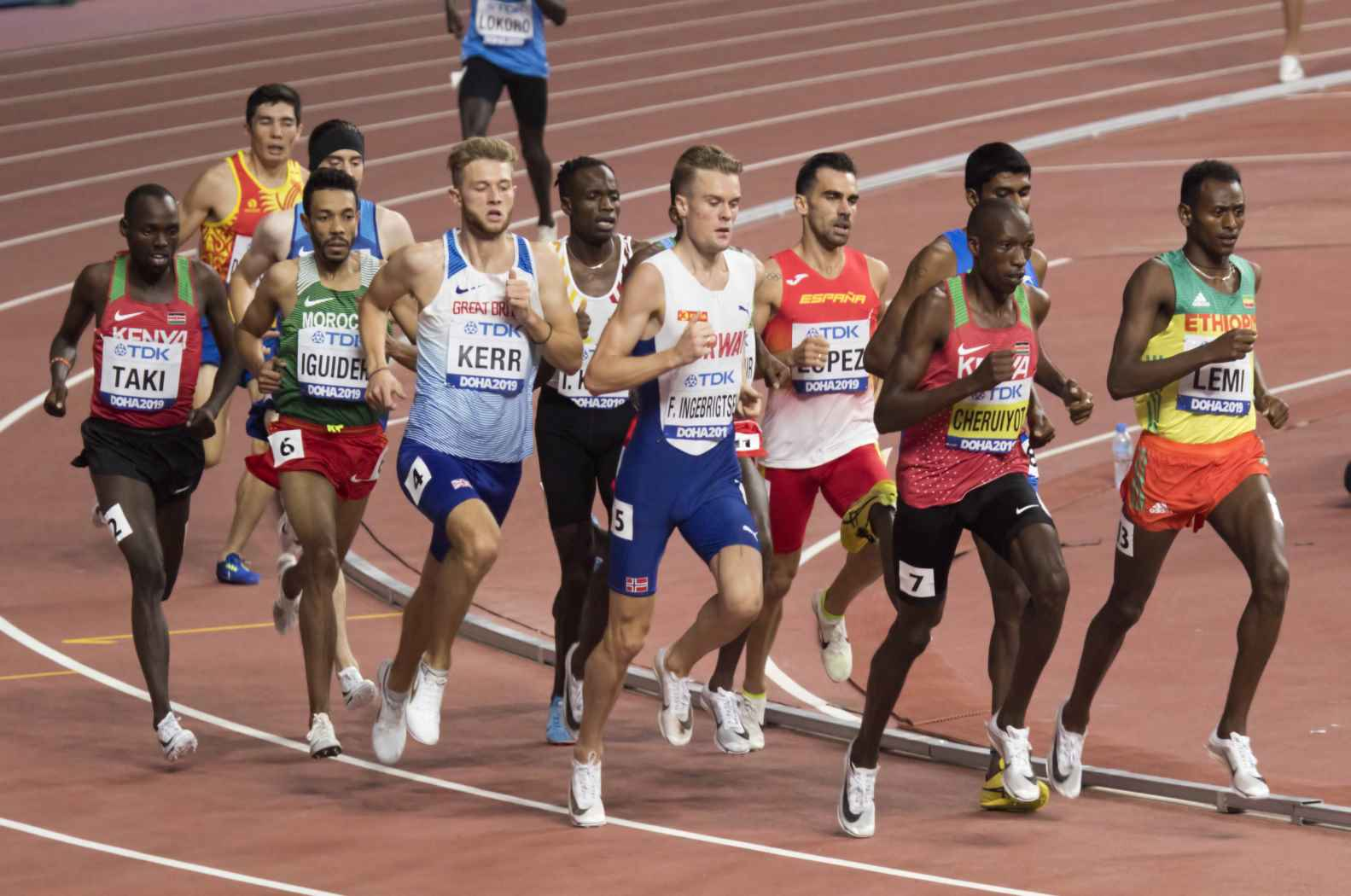 DOH70089 1500m men heats kimeli f ingebrigtsen